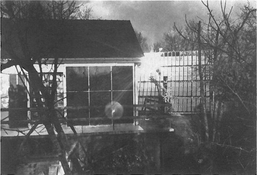 Sur la façade Sud de la maison, un insolateur à air chaud. Au fond, le concentrateur solaire en fonctionnement